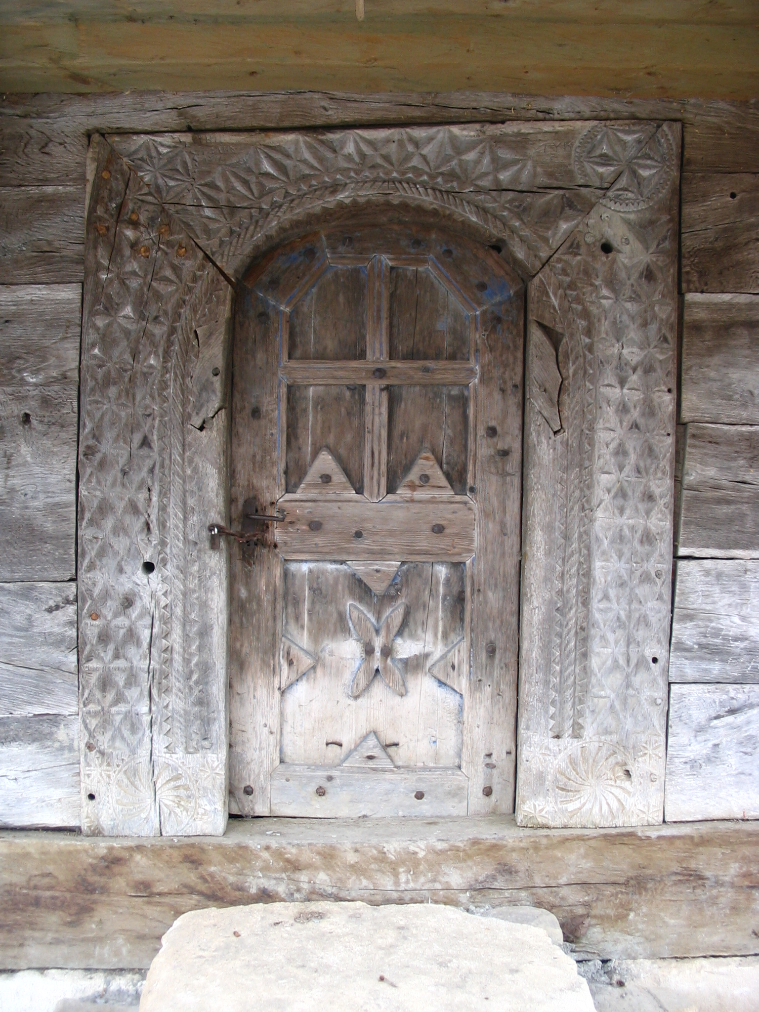 Portalul bisericii de lemn din Dobrin, judeţul Sălaj.